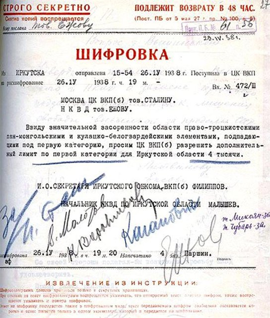 26. April 1938: Bitte um Erhöhung der Quoten im Rahmen des NKWD-Befehls Nr. 00447 durch den Kommissarischen Sekretär des Gebietskomitees der VKP(b) von Irkutsk A. A. Filippov und den Leiter des UNKVD von Irkutsk B. A. Malyšev Angesichts der erheblichen Verunreinigung des Gebiets durch Rechtstrotzkisten, panmongolische und kulakisch-weißgardistische Elemente, die der ersten Kategorie zuzuordnen sind, bitten wir das ZK der VKP(b), dem Gebiet Irkutsk für die erste Kategorie ein zusätzliches Limit von 4000 Personen zu genehmigen. Das chiffrierte Telegramm wurde um 15.54 Uhr abgeschickt und um 19.20 dechiffriert. Es liegt folgender Beschluss vor: Dafür: Stalin, Molotow, Woroschilow, Kaganowitsch, Jeschow (Unterschriften, Autogramme). Dafür: Mikojan, Tschubar. Die Entscheidung wurde als Beschluss des Politbüros des ZK der VKP(b) formuliert, Protokoll der Sitzung Nr. 61, Punkt 56, vom 29. April 1938. Auszüge aus dem Beschluss wurden an Jeschow und an das Gebietskomitee des VKP(b) geschickt. Quelle für das Bild: Rolf Binner, Bernd Bonwetsch, Marc Junge: Massenmord und Lagerhaft. Die andere Geschichte des Großen Terrors (Veröffentlichungen des Deutschen Historischen Instituts Moskau, Bd. 1), Akademie Verlag, Berlin 2009, ISBN 978-3-05-004662-4, S. 356. Quelle für die deutsche Übersetzung der Bitte, für die Entscheidung und die weitere Behandlung des Beschlusses: Rolf Binner, Bernd Bonwetsch, Marc Junge: Massenmord und Lagerhaft. Die andere Geschichte des Großen Terrors (Veröffentlichungen des Deutschen Historischen Instituts Moskau, Bd. 1), Akademie Verlag, Berlin 2009, ISBN 978-3-05-004662-4, S. 339.